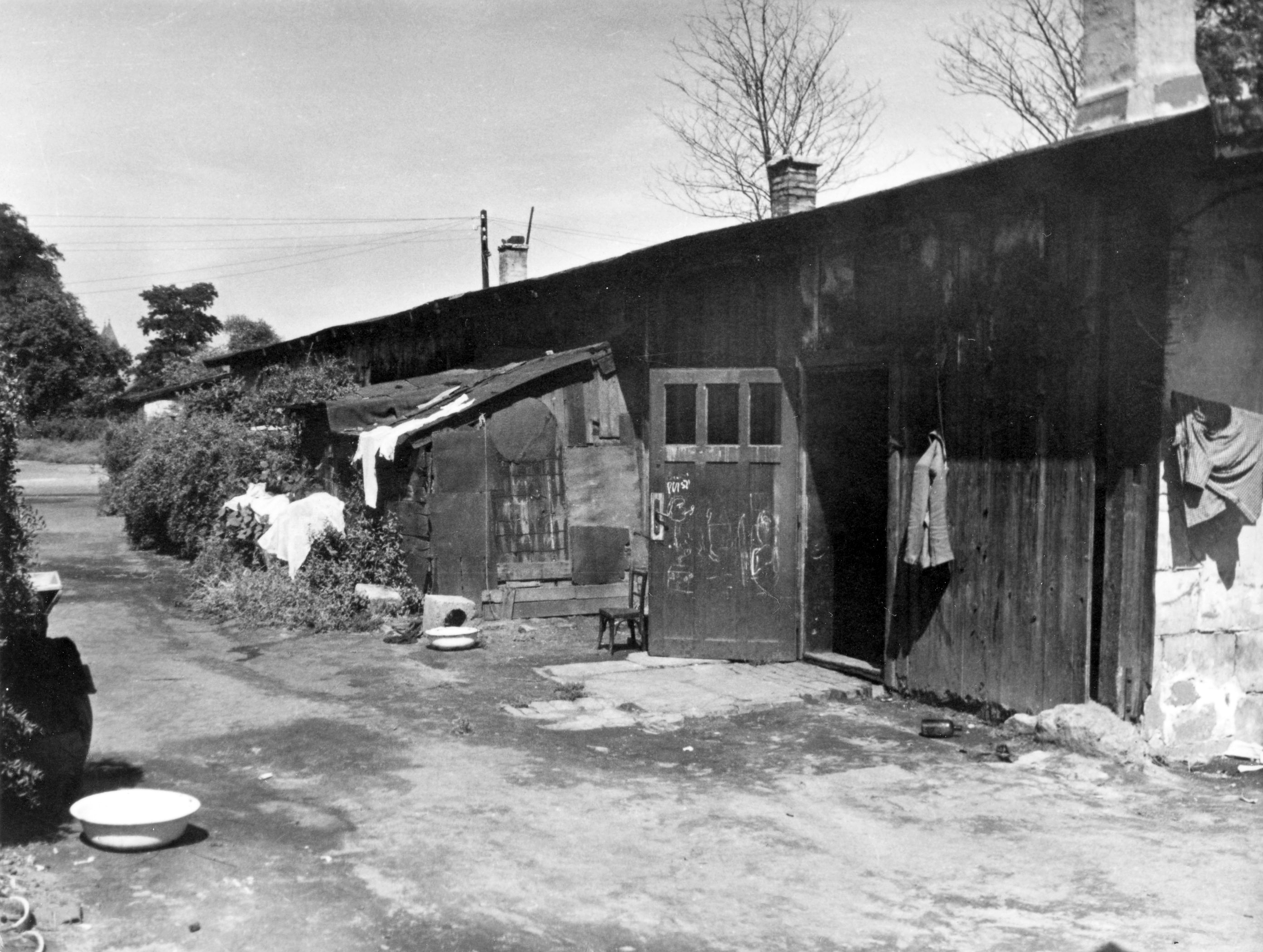 Mária Valéria telep. A kép forrását kérjük így adja meg: Fortepan / Budapest Főváros Levéltára. Levéltári jelzet: HU_BFL_XV_19_c_11 Location: Hungary, Budapest IX. Tags: Budapest Title: Mária Valéria telep. A kép forrását kérjük így adja meg: Fortepan / Budapest Főváros Levéltára. Levéltári jelzet: HU_BFL_XV_19_c_11